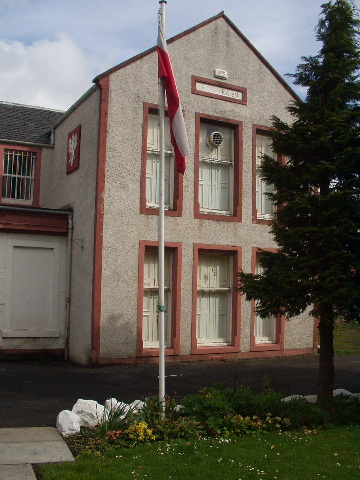 Kirkcaldy.Dom Stowarzyszenia Kombatantów Polskich.